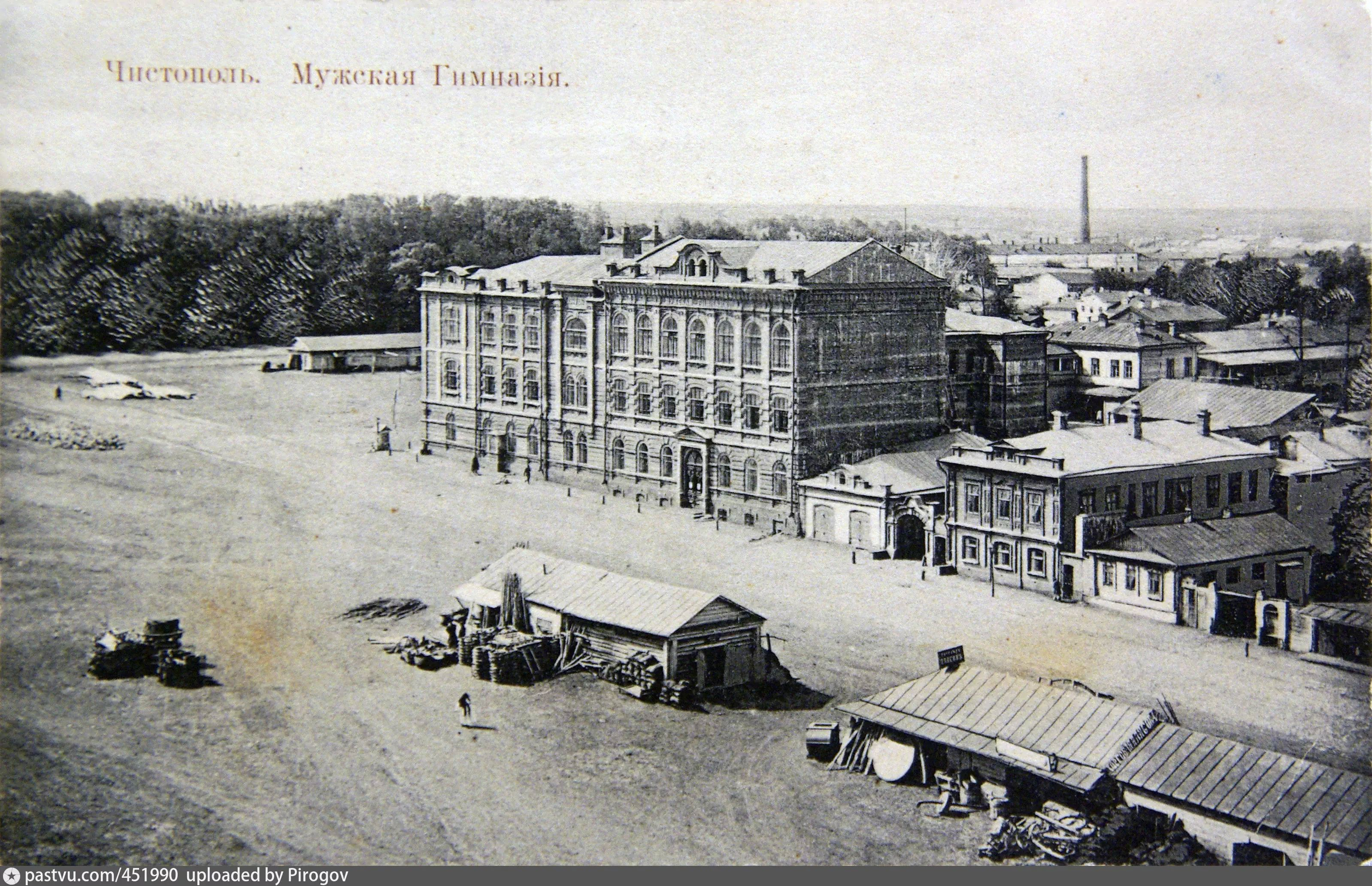 Татарстан Чистополь мужская гимназия, 1912